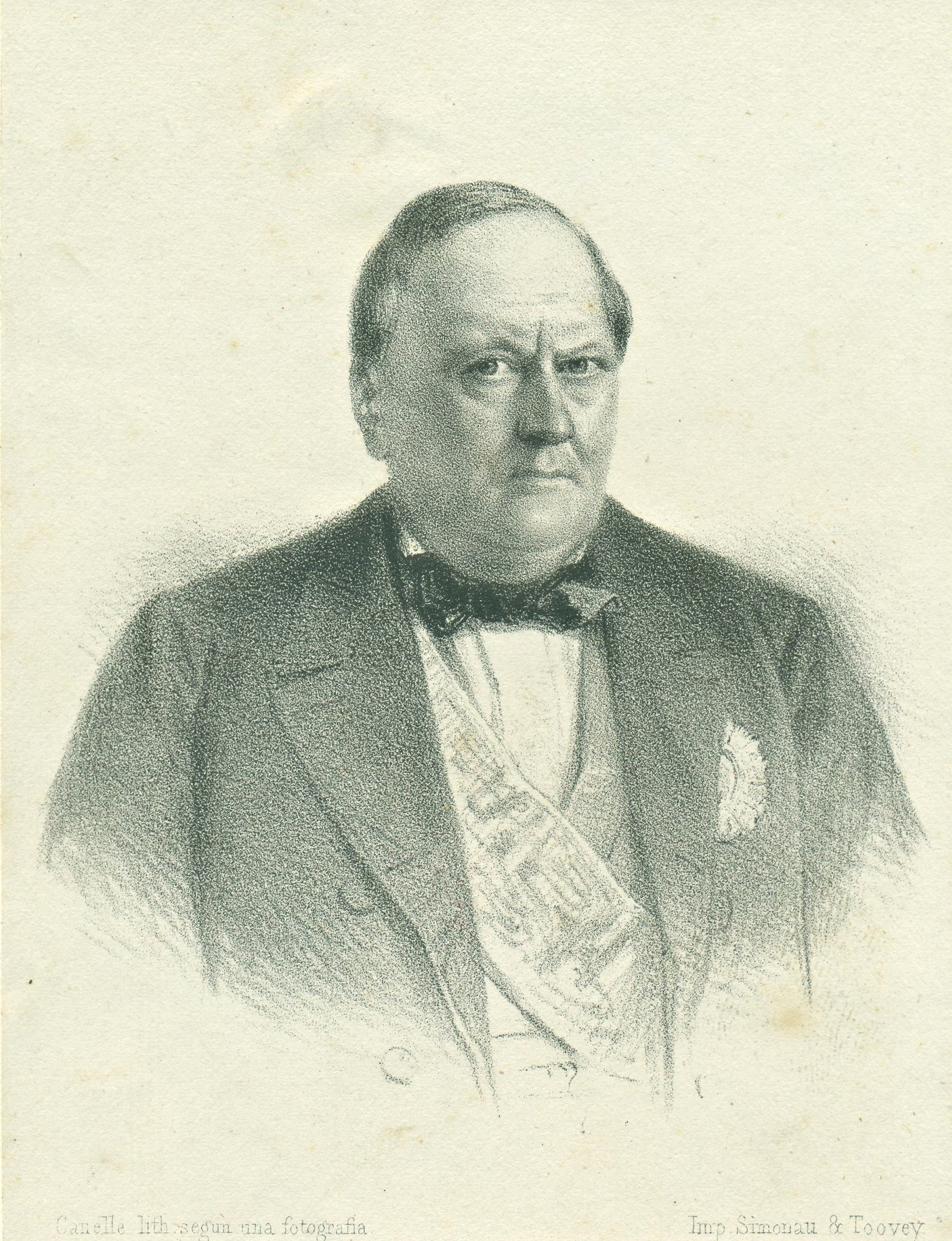 Carlos Antonio Lopez, Presidente da República do Paraguai.